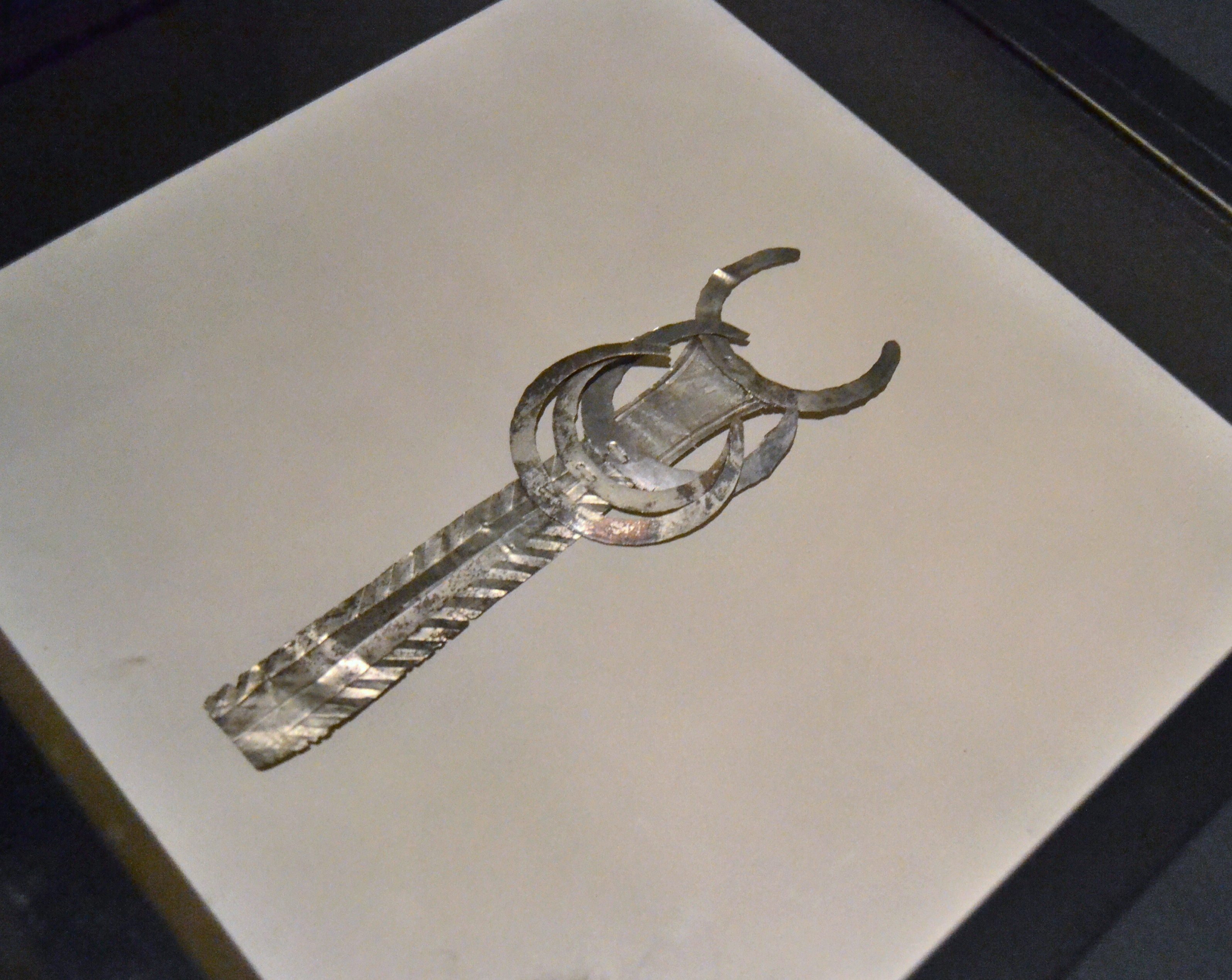 Làmina votiva, tresor de Hagenbach, Museu Històric del Palatinat. Del segle III dC, plata. De les 129 làmines del tresor, aquesta és l'única que porta quatre aplics en forma de lluna creixent. La inscripció que porta és una altra de les seues peculiaritats. Enuncia que un aquità anomenat Andossus, fill d`Obbelex, ha dedicat la làmina al déu Mart. Va arribar a les aigües del Rin a conseqüència del saqueig dels llocs del culte pels alamans.